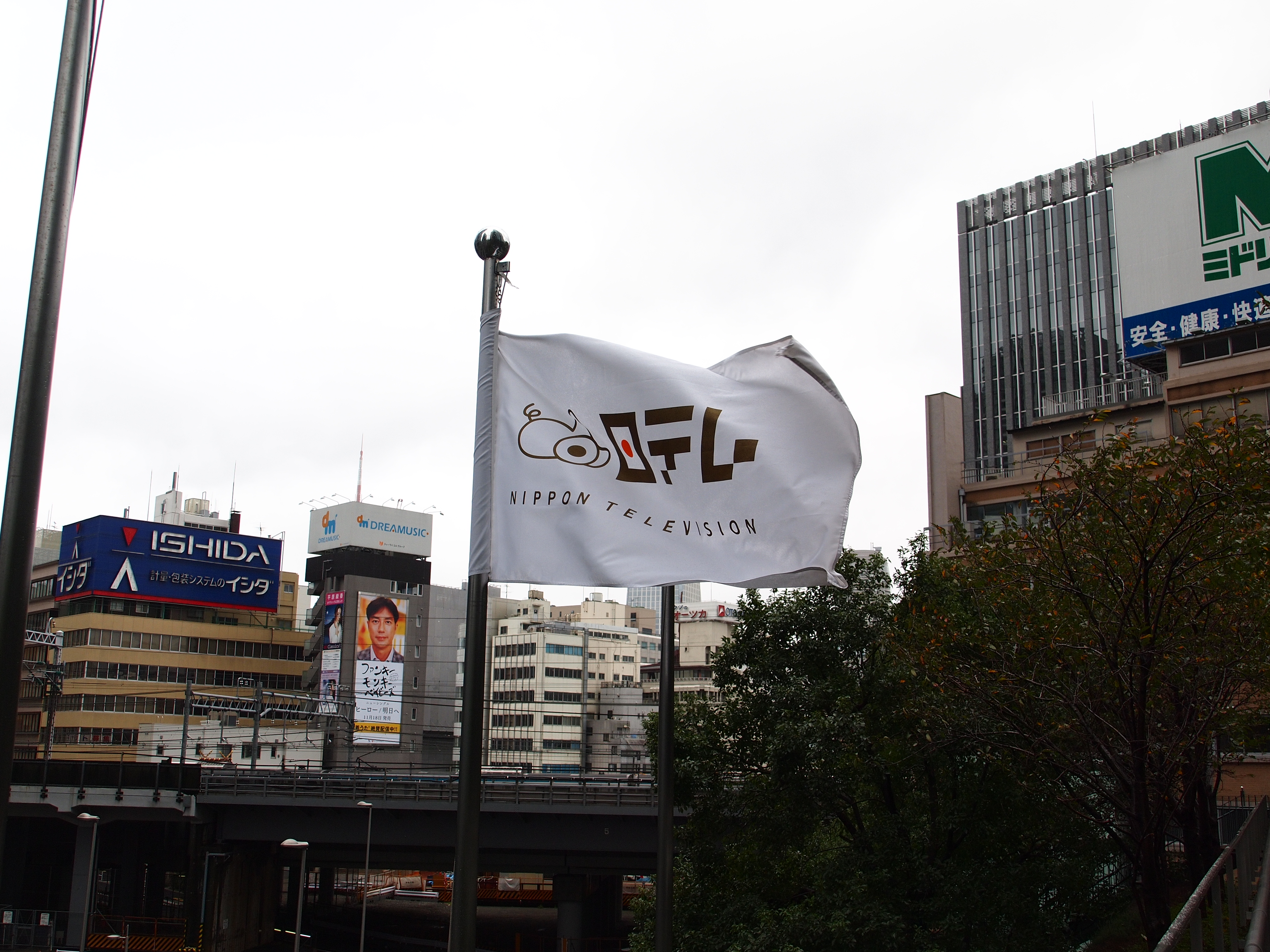 2009年日本電視台公司旗。